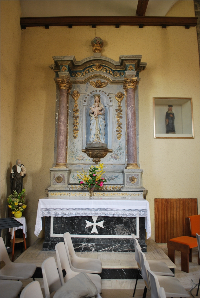 Autel latéral gauche de l'église Saint-Siméon de L'Huisserie